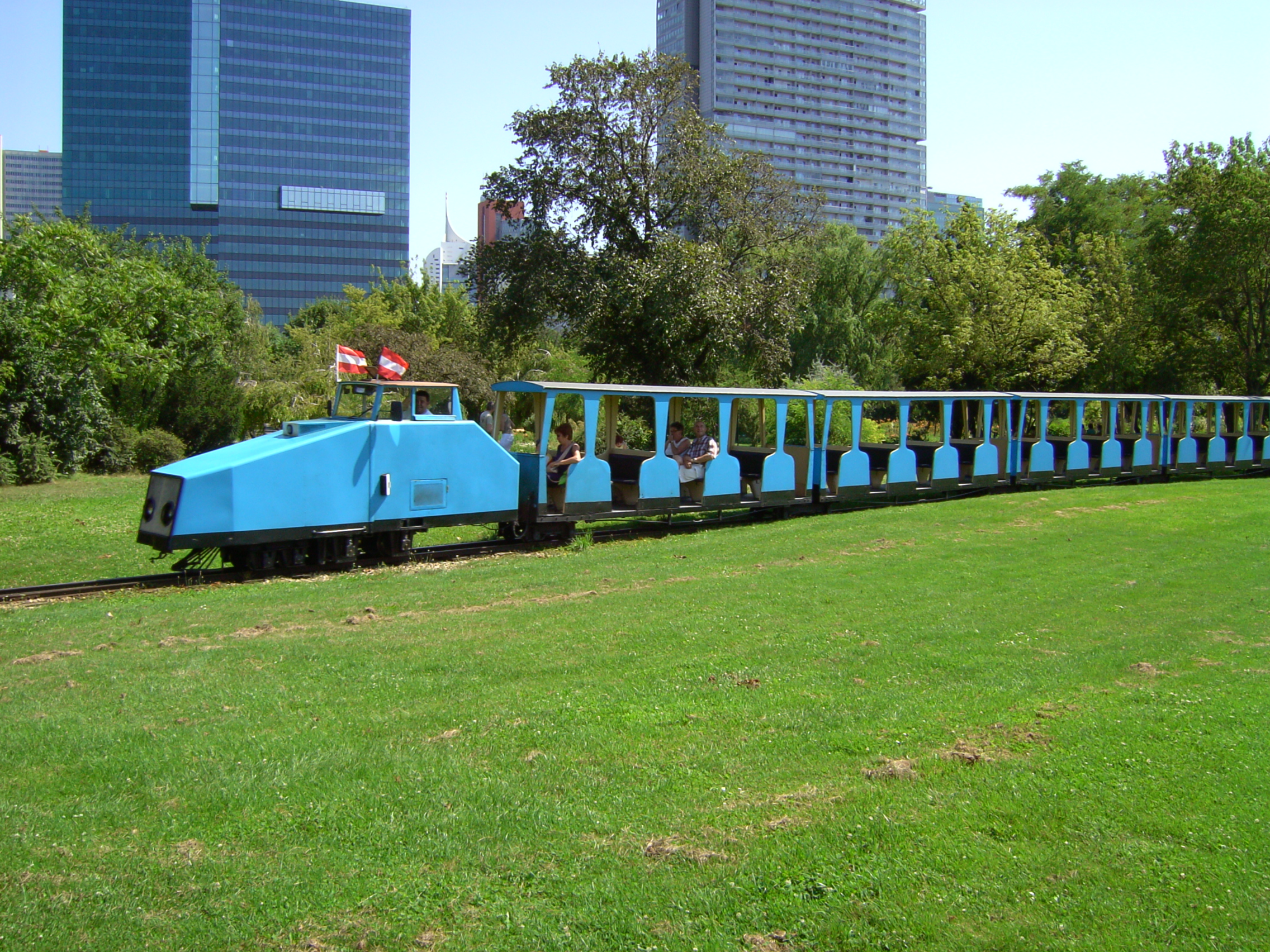 Donauparkbahn - Lok D3 mit blauem Zug, südlich der sogenannten "Papstwiese".